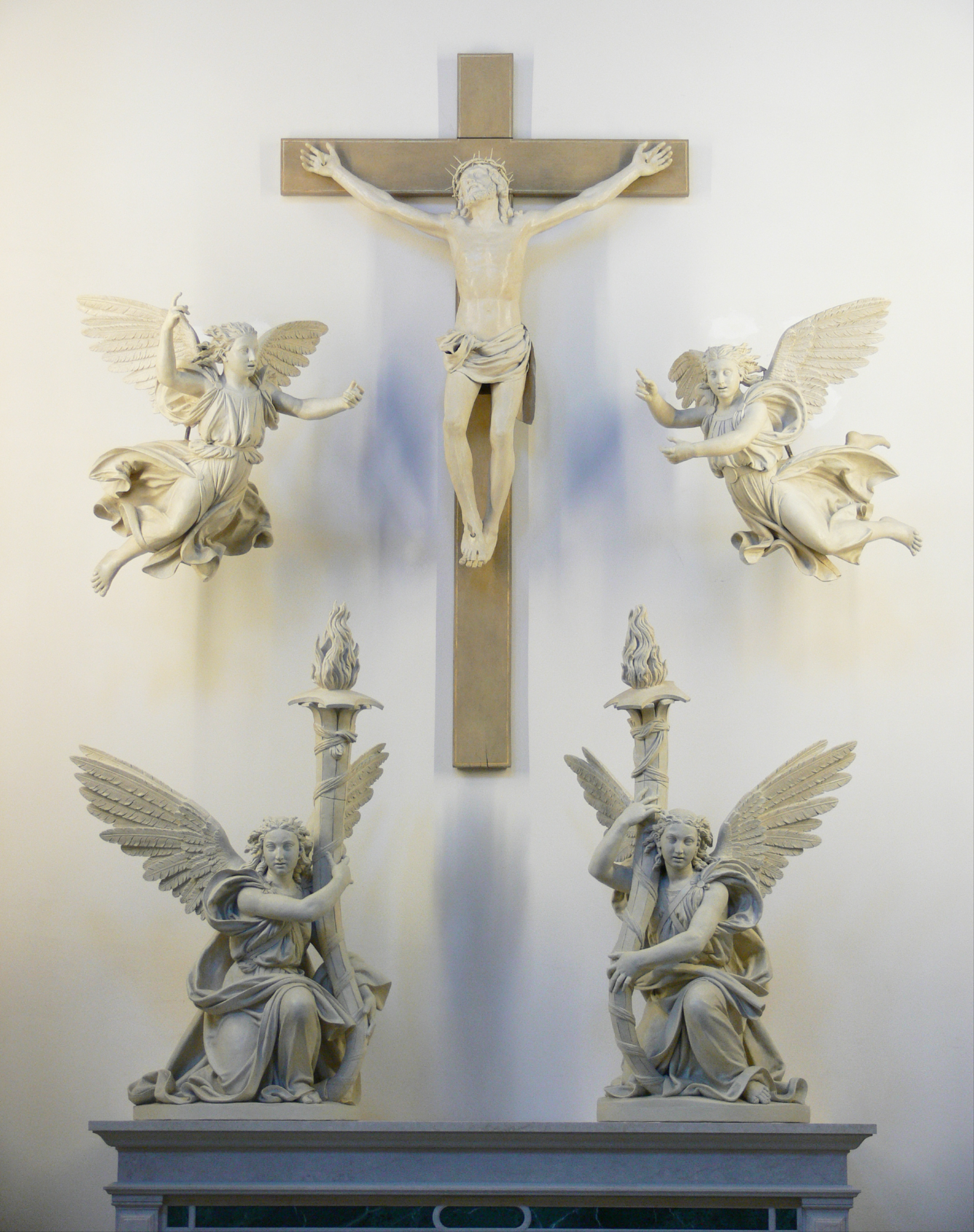 Kruzifix: historisierender Gipsabguss aus dem 19. Jahrhundert Engel: Originale, gebrannter Ton Crucifix: plaster cast from the 19th century Angels: original terracotta, white paint from the 19th century